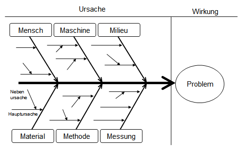 Neugezeichnetes Diagramm nach Vorlage von Benutzer:Aliparvizi, selbsterstellt